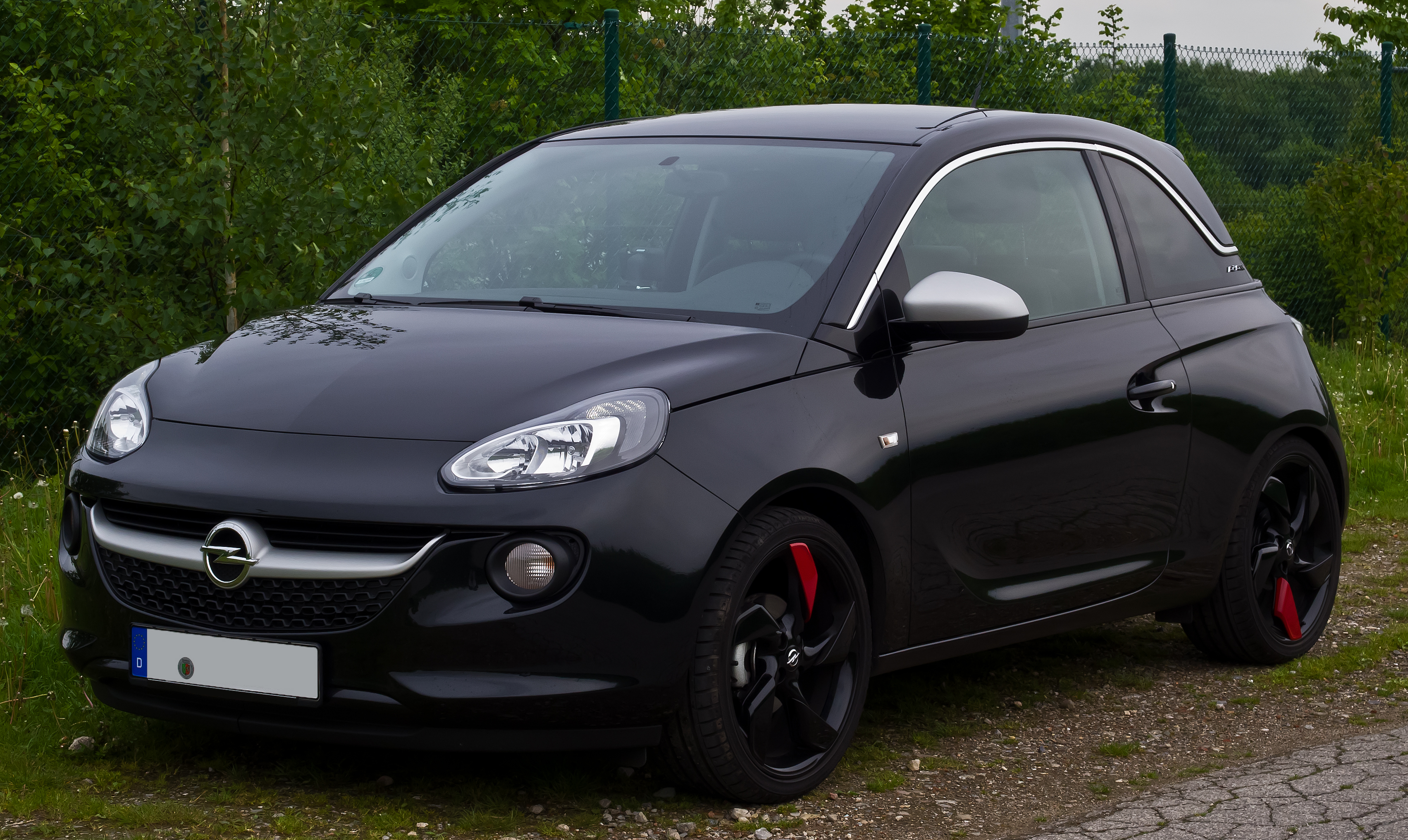 Opel Adam 1.4 Black Link